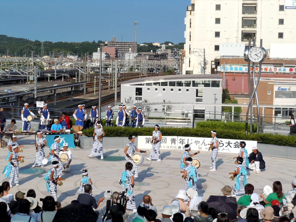 平七夕まつり じゃんがら踊り大会の風景